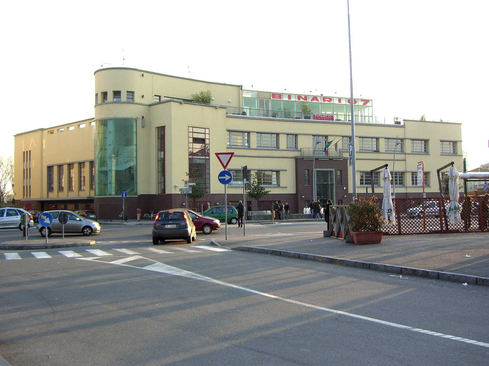 MB Monza piazza Castello ex casa G.I.L. (Gioventù Italiana del Littorio) ora noto come "Urban Center". 1934 ing. Aldo Putelli.